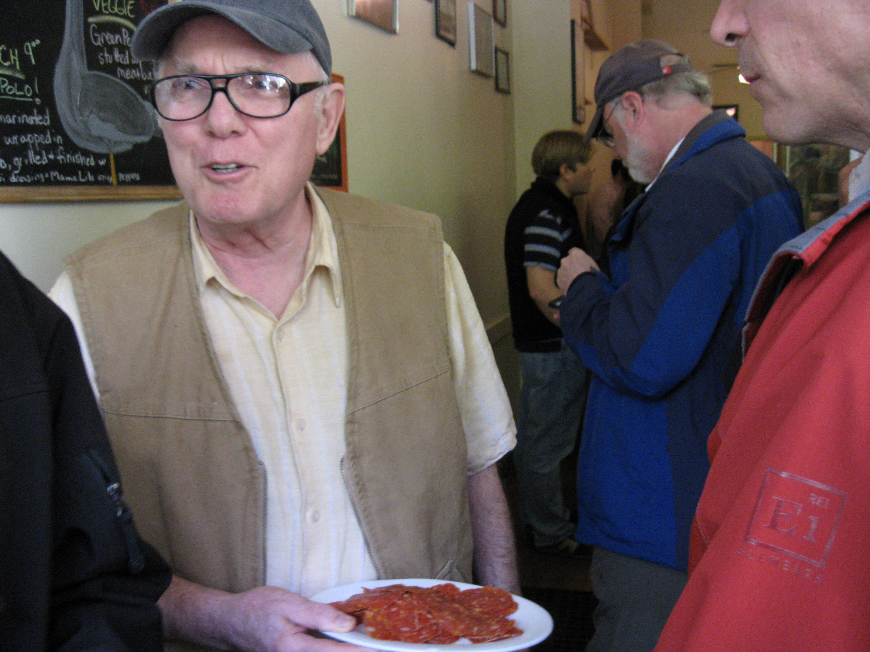 Armandino Batali of Salumi